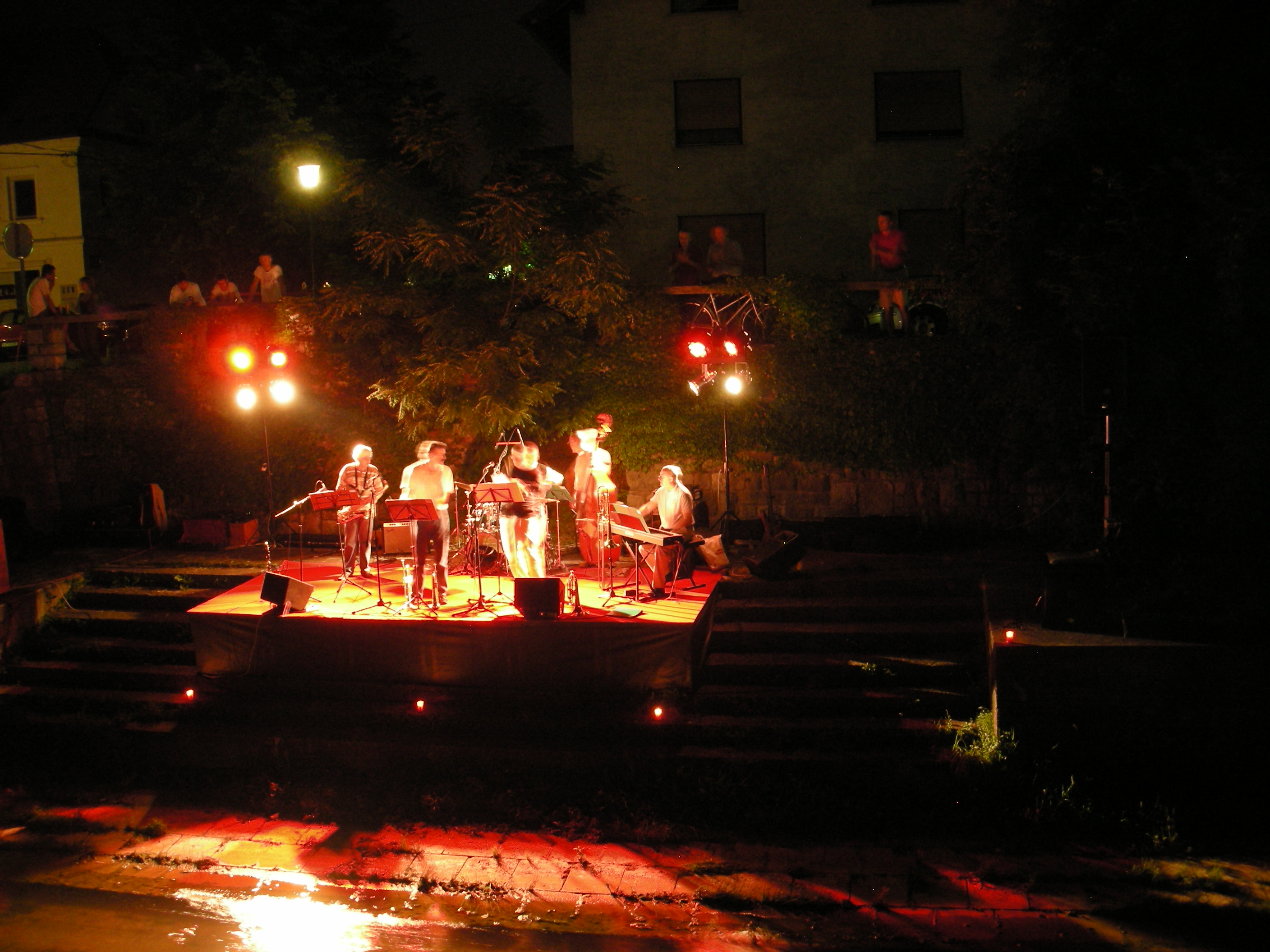 Ljubljana Jazz-concert Krakova